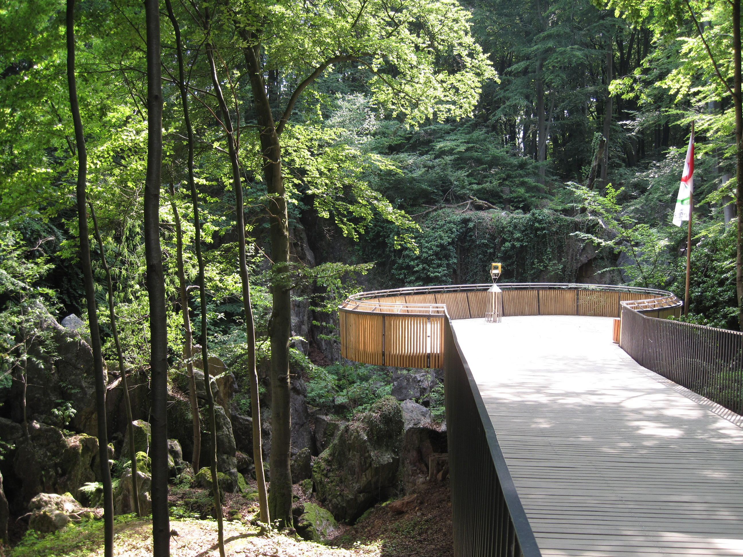 Aussichtsplattform im Naturschutzgebiet Felsenmeer in Hemer. Im Jahr 2010 Teilfläche der Landesgartenschau. Aussichtsplattform erbaut 2009/2010 nach Entwürfen des Mendener Architekturbüros Vedder und Berndes in Zusammenarbeit mit dem Ingenieurbüro Werner.